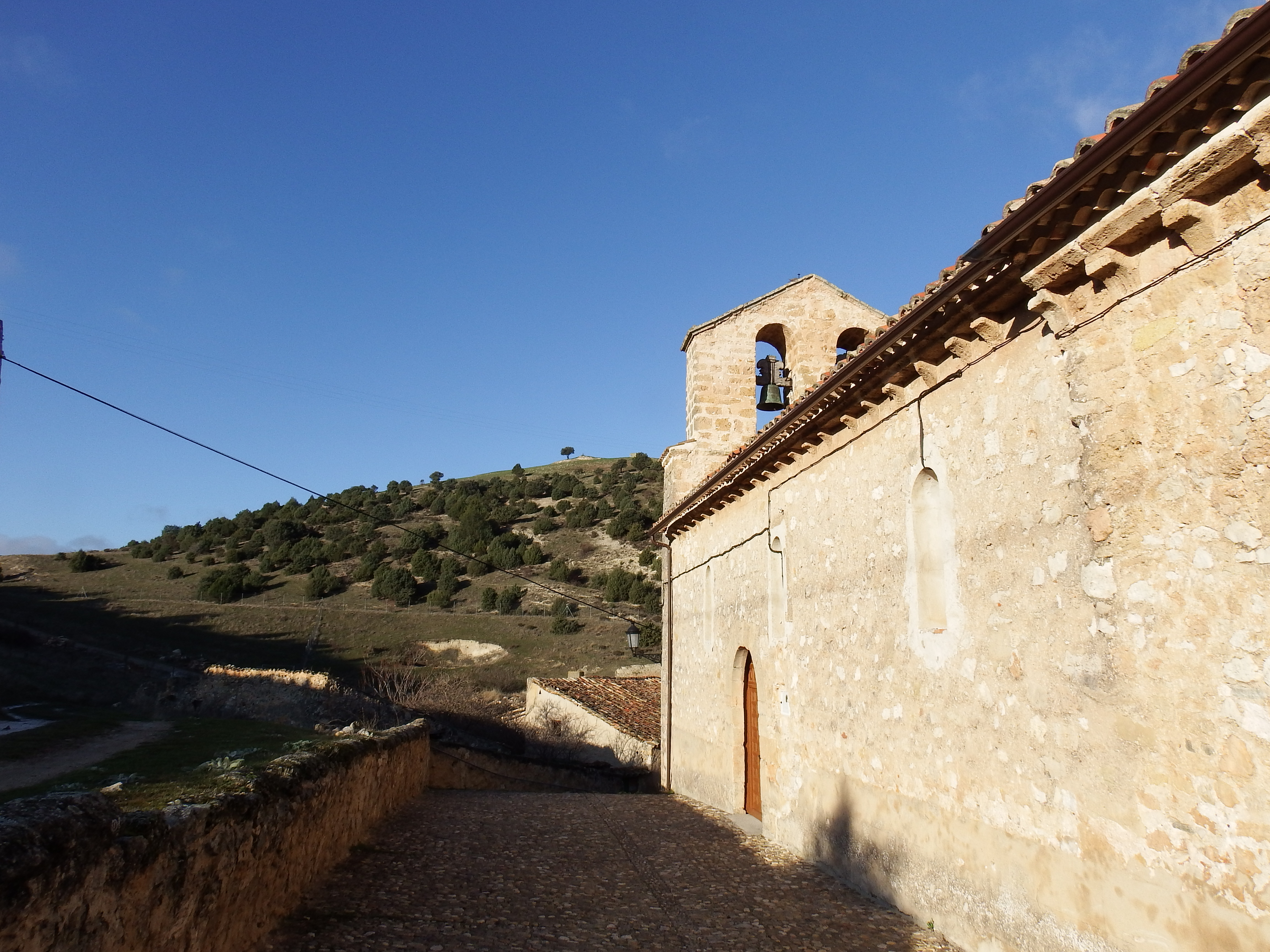 Baídes